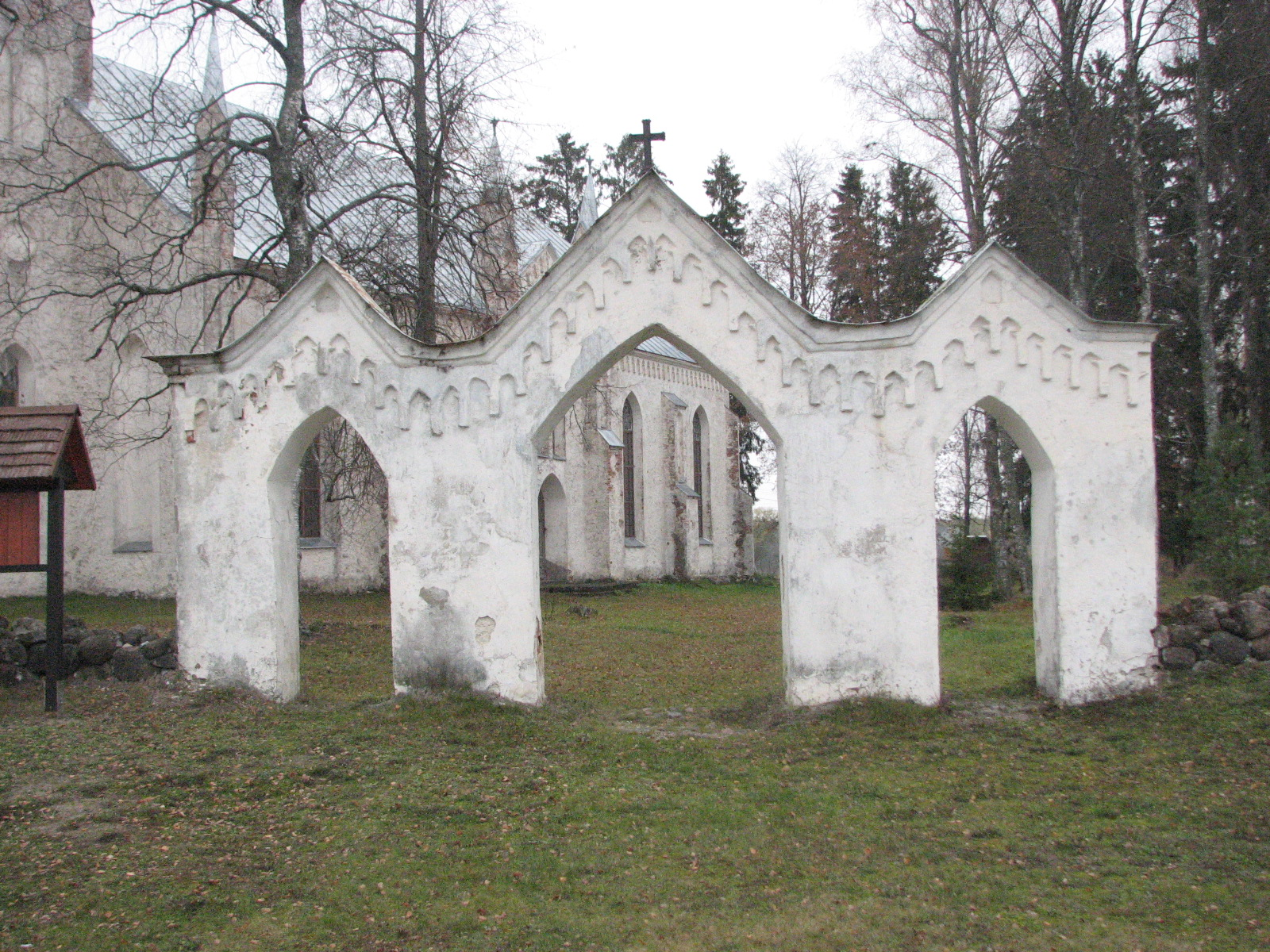 Lohusuu, Estonia